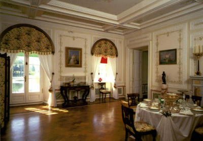 Столовая в Ольгином павильоне